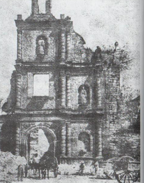 Fotografñia del Convento de San Francisco en Mérida de Yucatán en el siglo XIX.